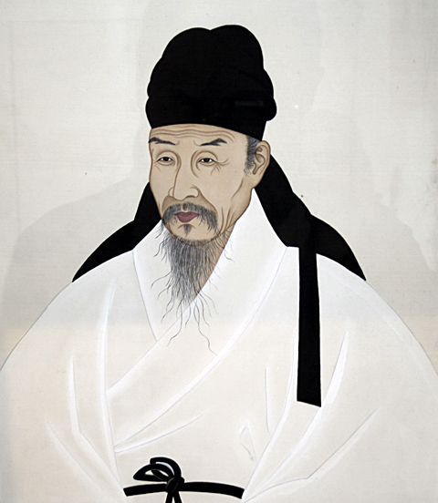 대전역사박물관 소장